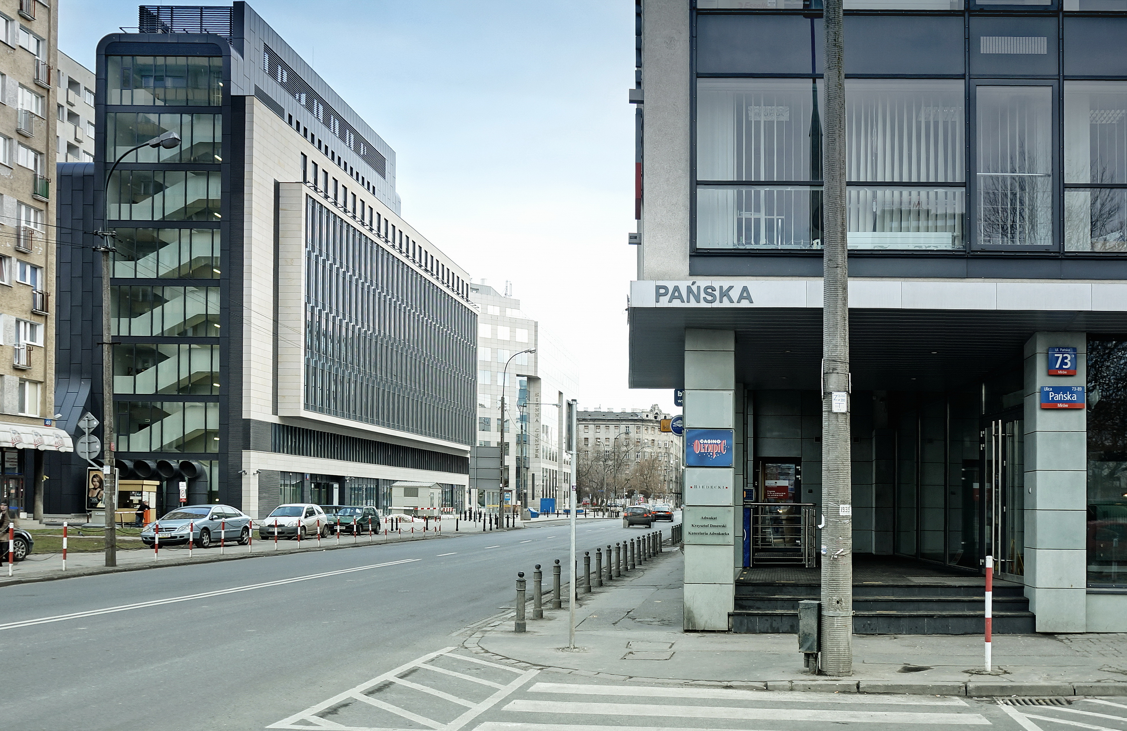 ul. Żelazna róg z Pańską